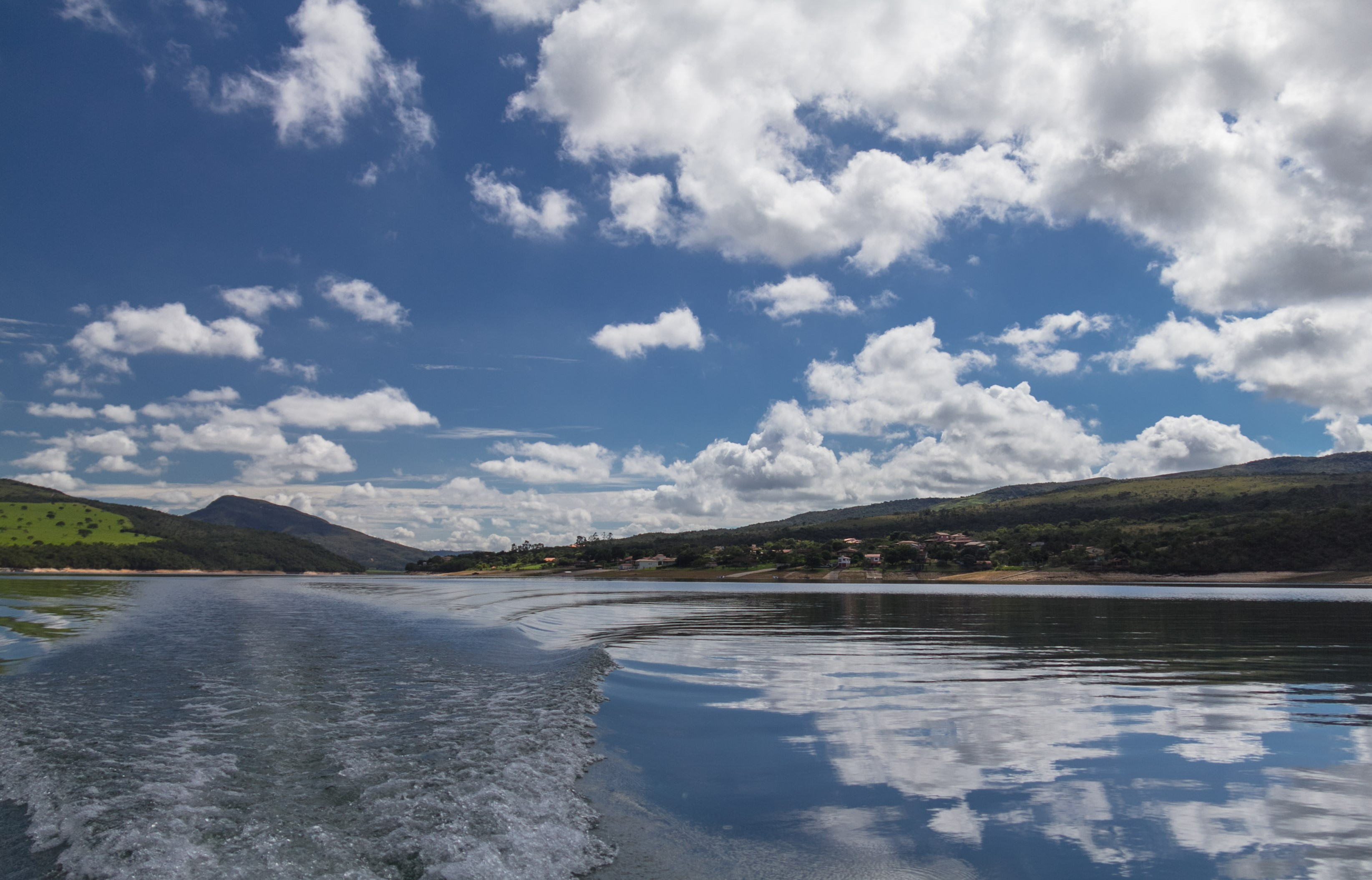 Maravilhas do lago de Furnas,regiao de Capitolio/Escarpas do Lago no estado de Minas Gerais.